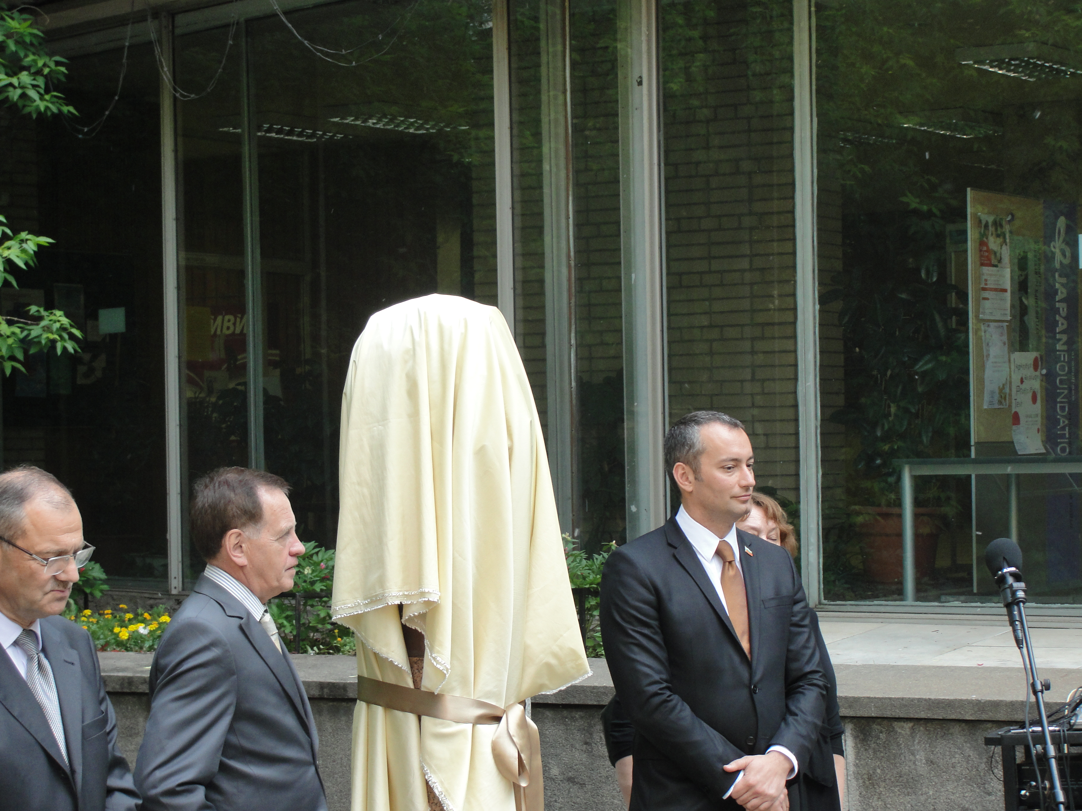 Министър Младенов открива бюст-паметник на Иван Вазов